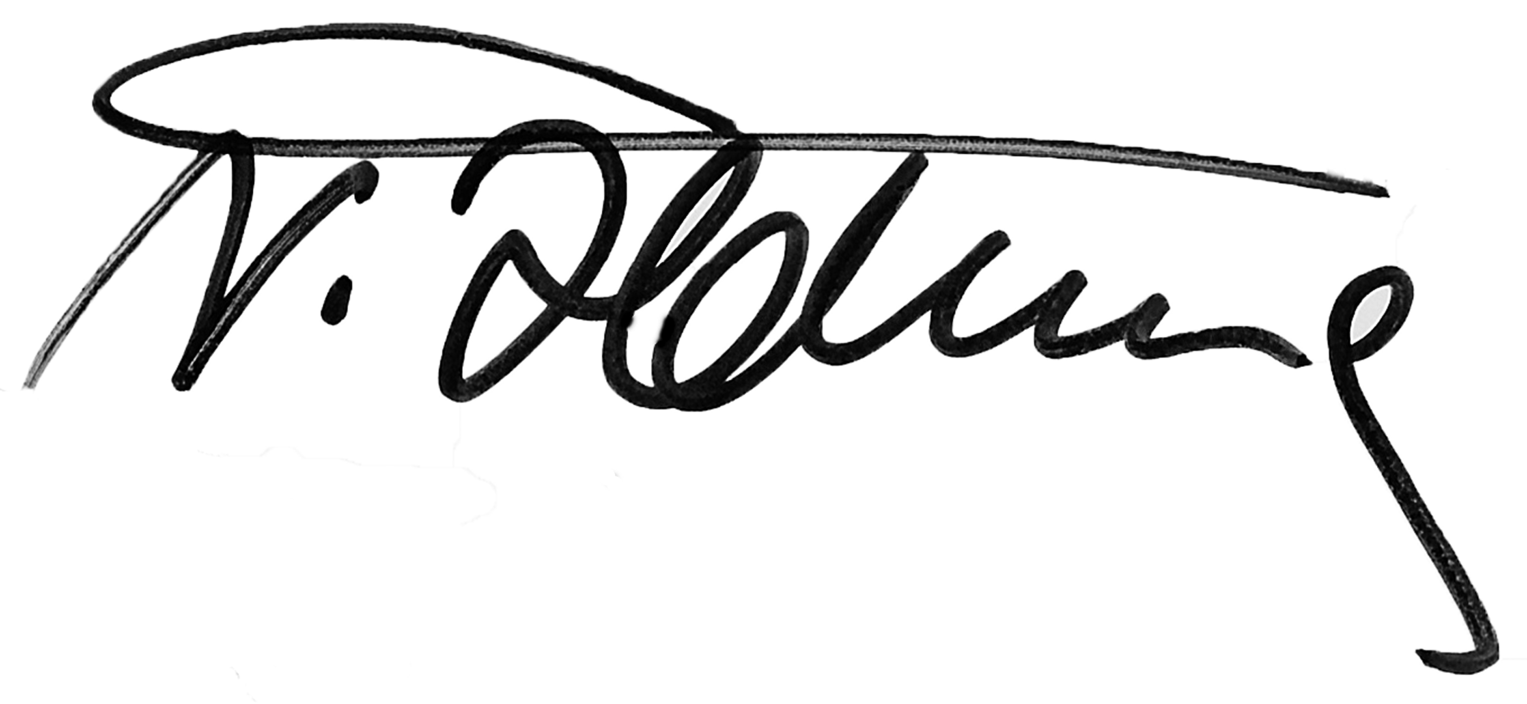 Unterschrift von Volker Hartung